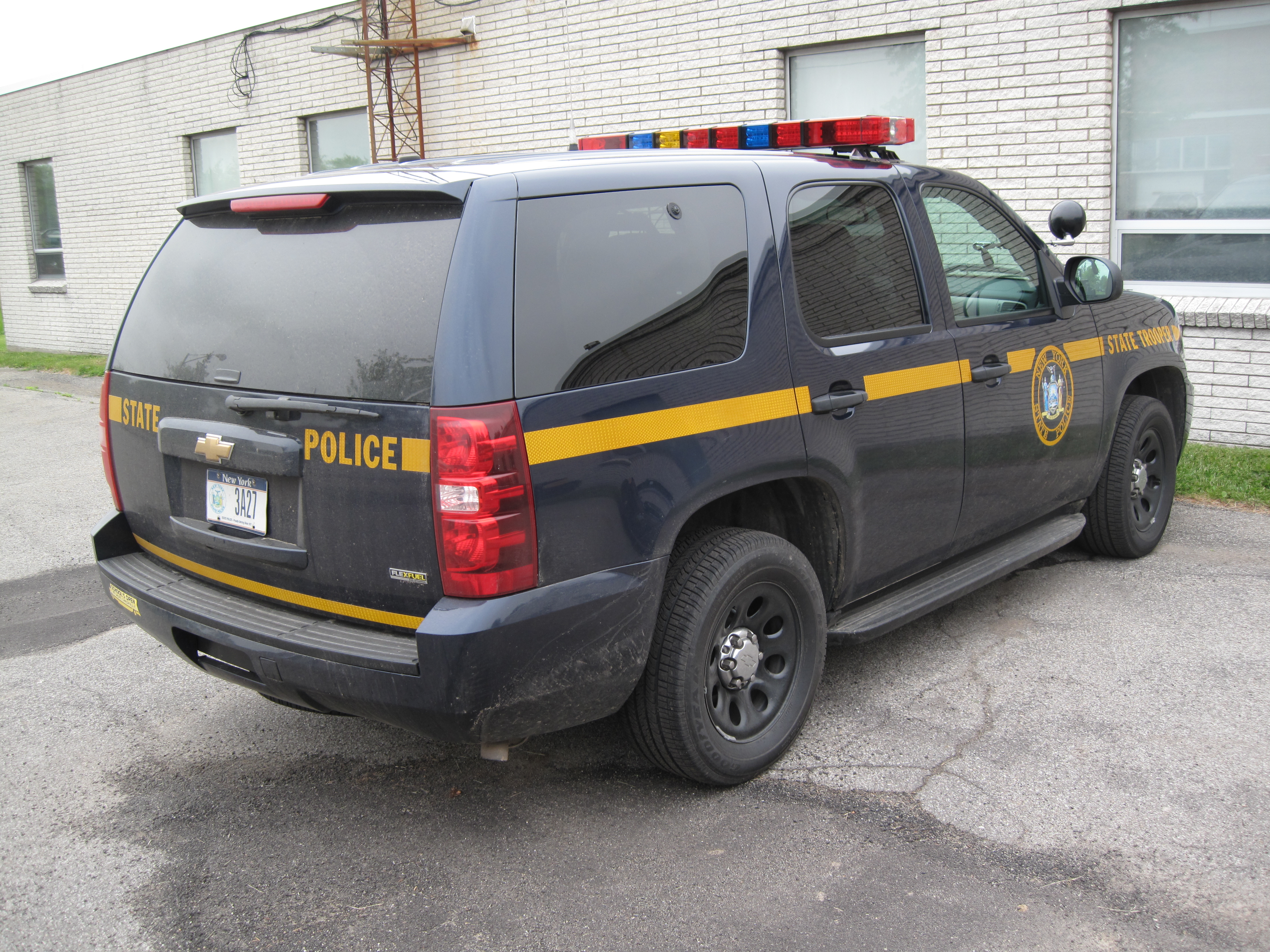 State Police New York poliieauto